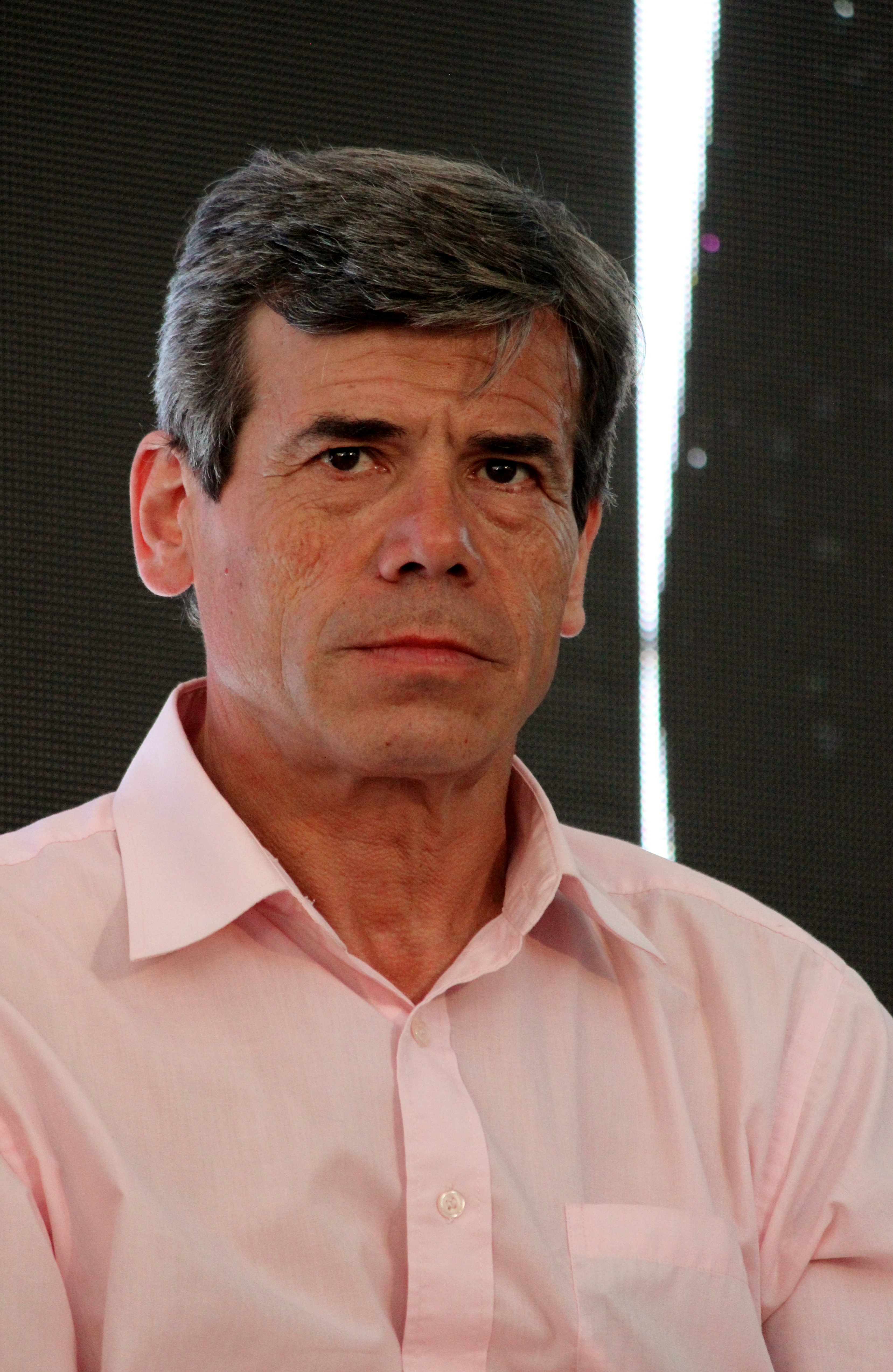 El poeta chileno Lorenzo Peirano durante la presentación de la Antología de poesía chilena / Volumen III. La generación post 87: otra vuelta de tuerca (compiladores: Teresa Calderón, Lila Calderón, Thomas Harris) en la segunda etapa del Festival de Autores de Santiago 2018 realizada en el GAM.